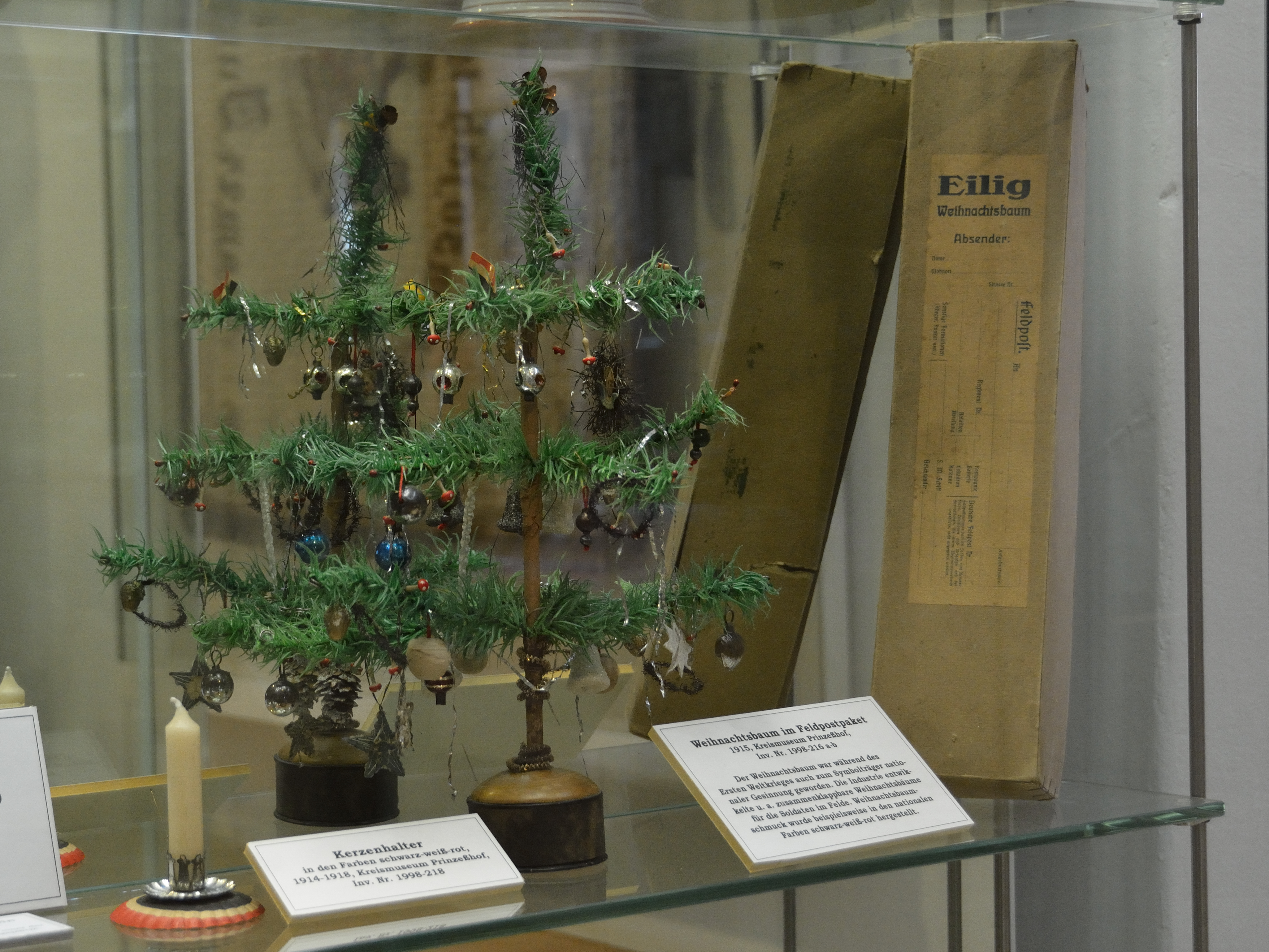 Klappbarer Weihnachtsbaum als Feldpost, Erster Weltkrieg. Ausstellungsstück im Kreismuseums des Kreises Steinburg, dem Prinzeßhof.